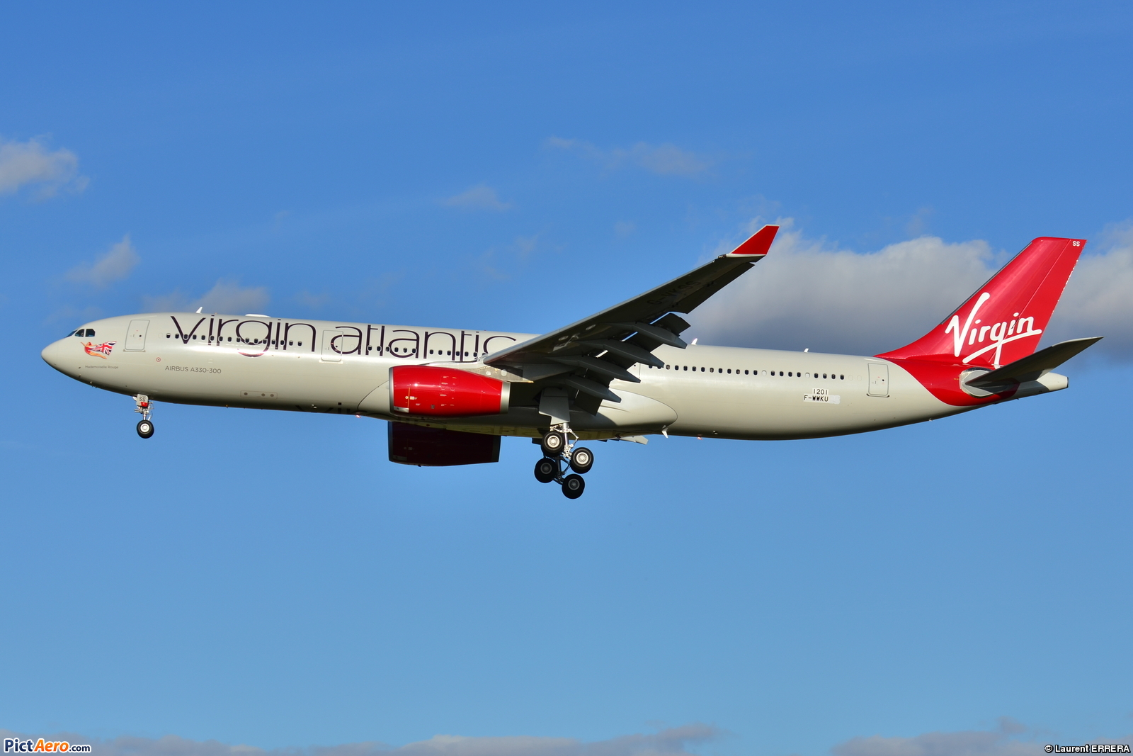 Photo prise à l'aéroport de Toulouse-Blagnac (LFBO) en France. Picture take at Toulouse-Blagnac Airport (LFBO) in France.